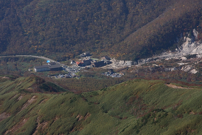 五色温泉をニセコアンヌプリより望む。